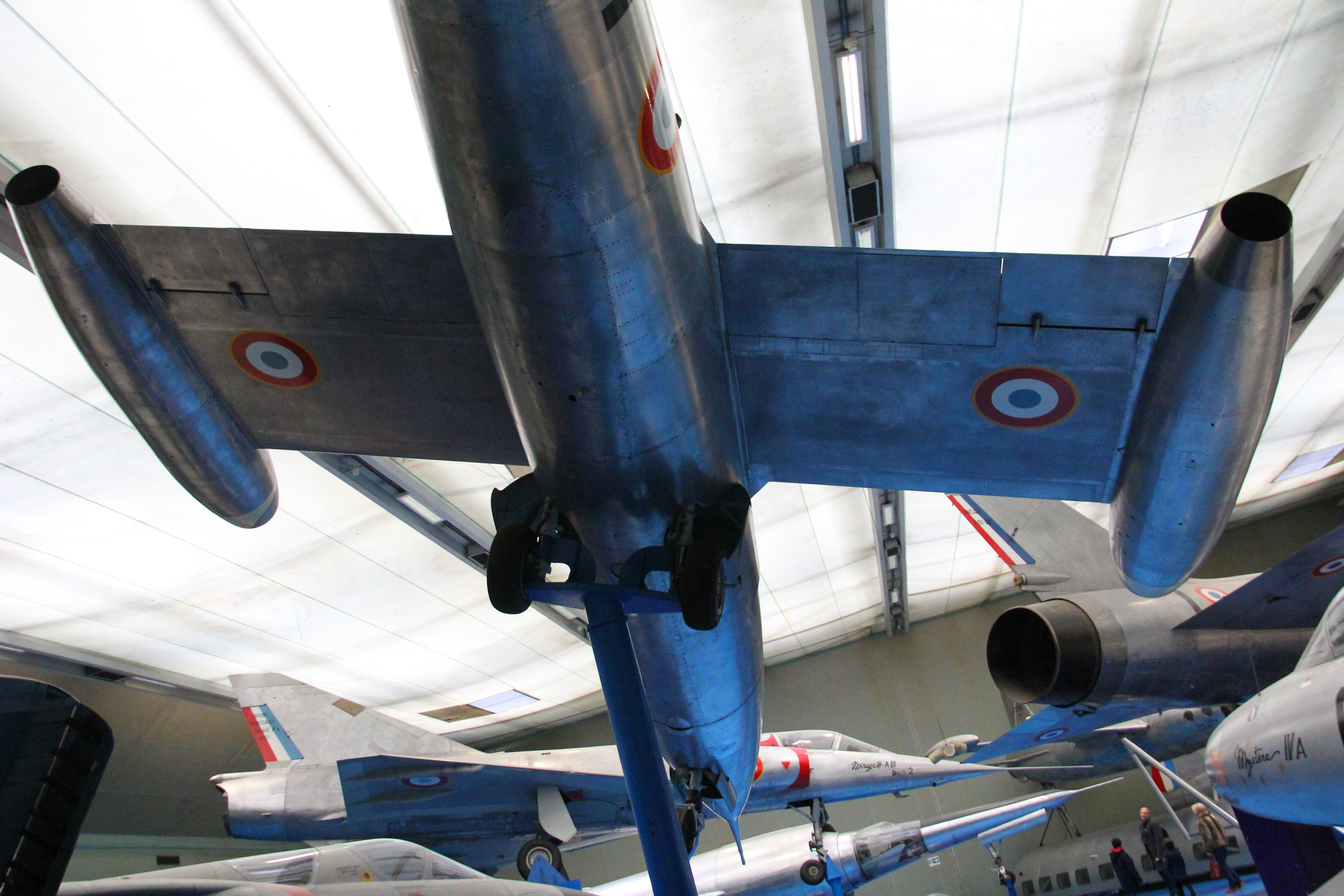 SNCASO Trident